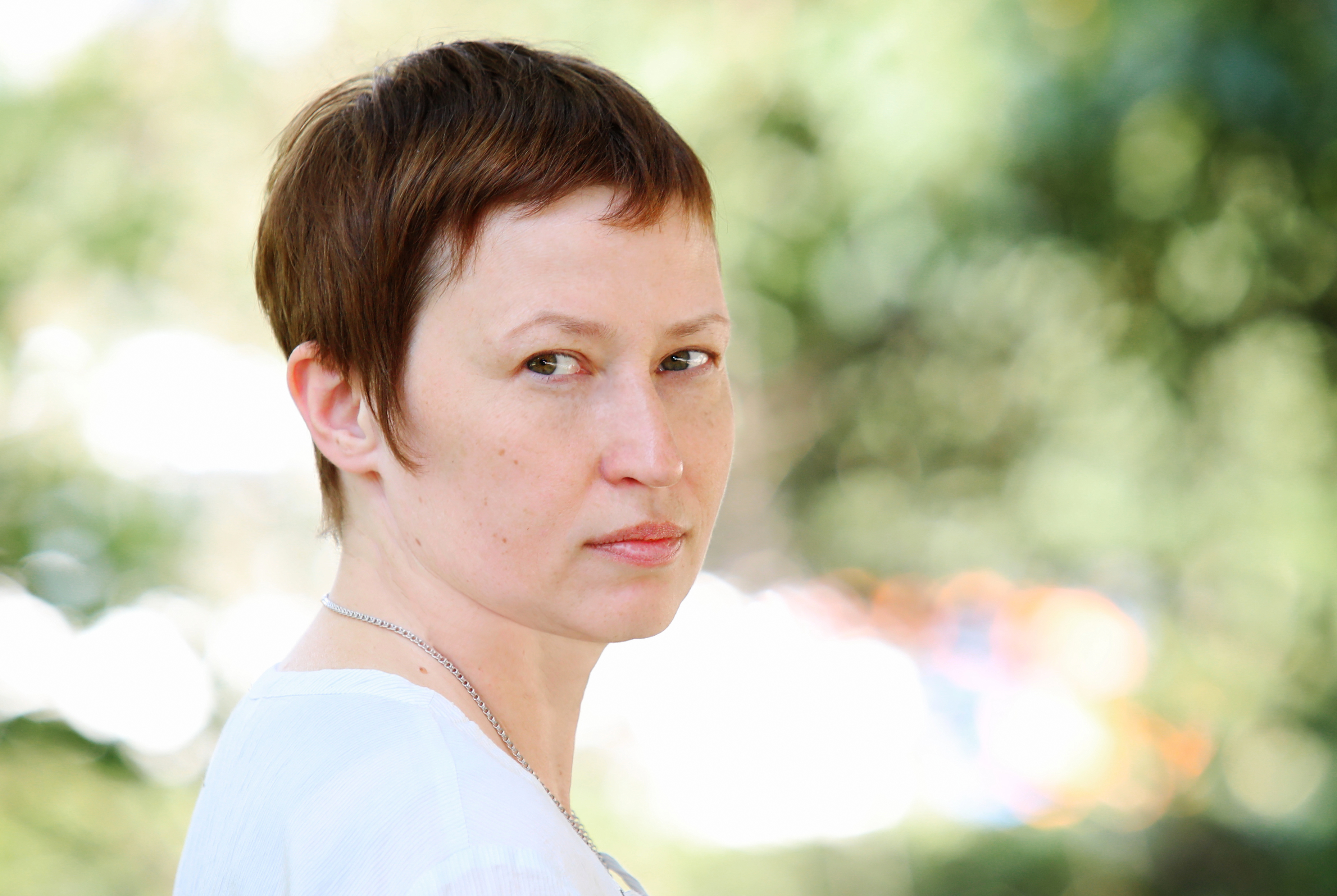 Анна Голубкова (псевдоним Анна Сапегина) — российский литературный критик, литературовед, прозаик, поэт.